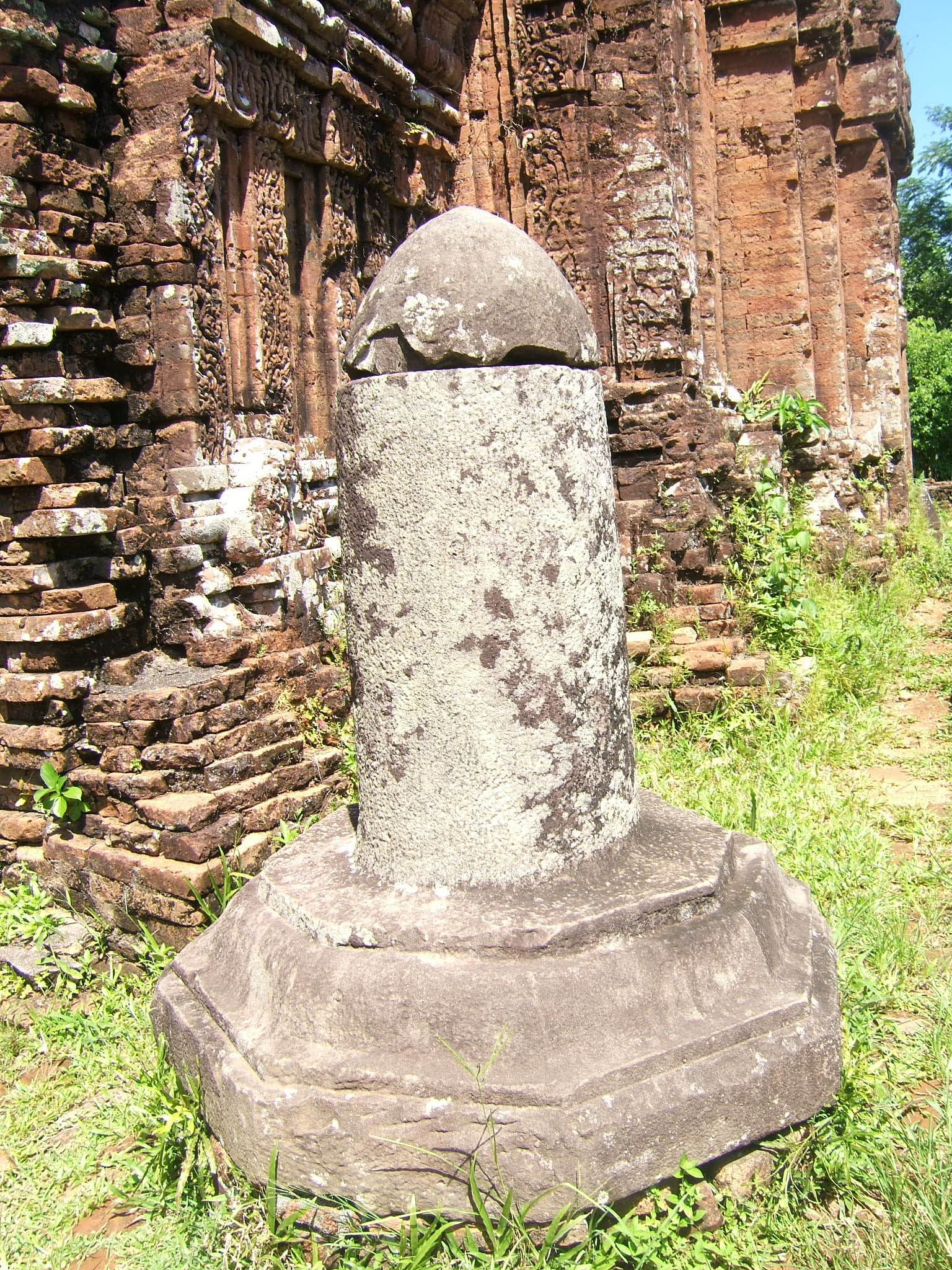 Linga 1 (My Son)